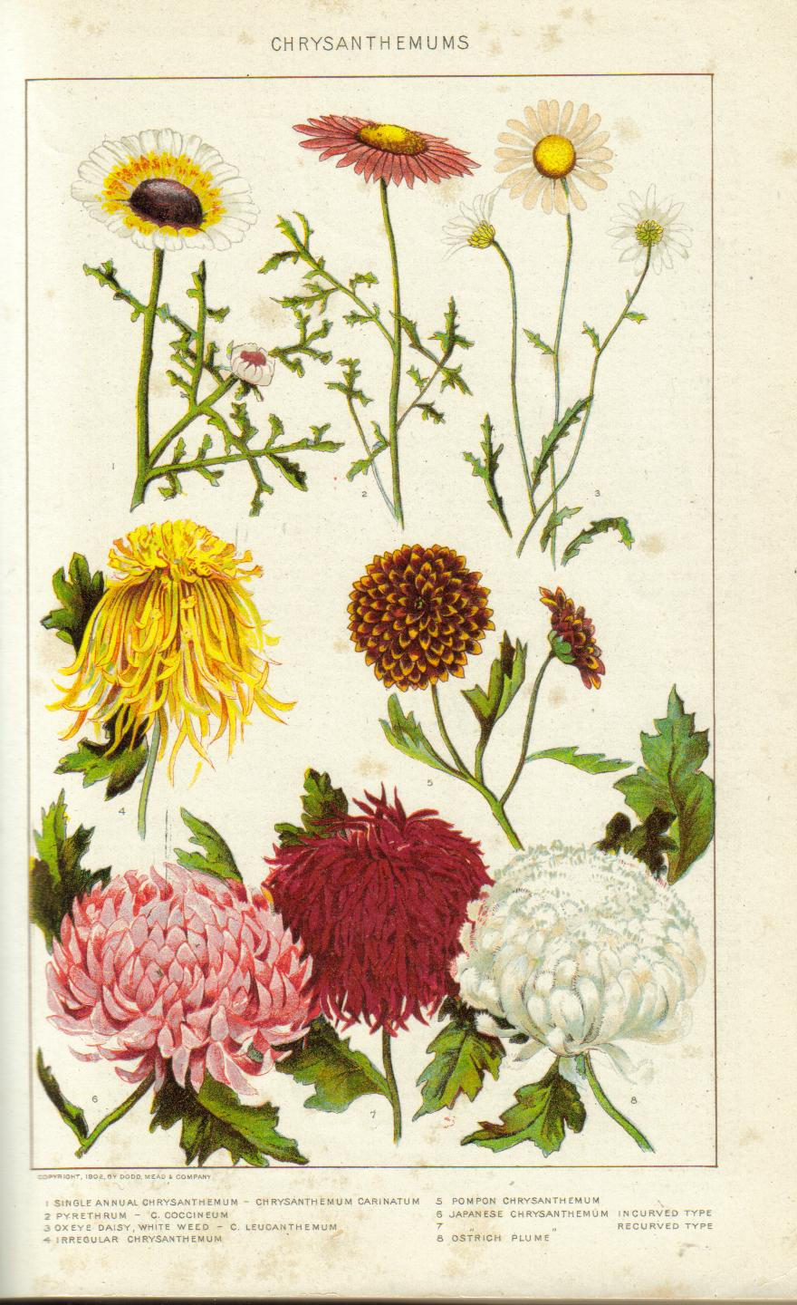 Painting